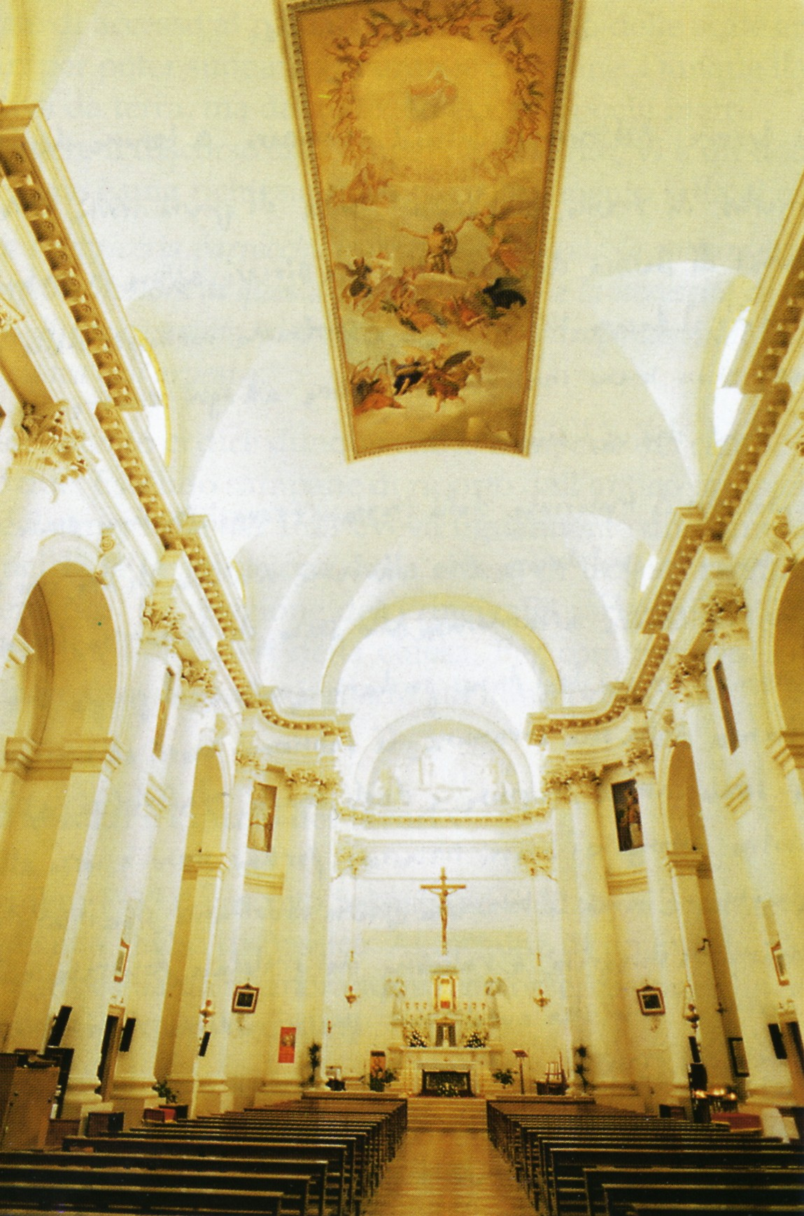 Bessica, frazione di Loria: chiesa di San Giovanni Battista, interno.